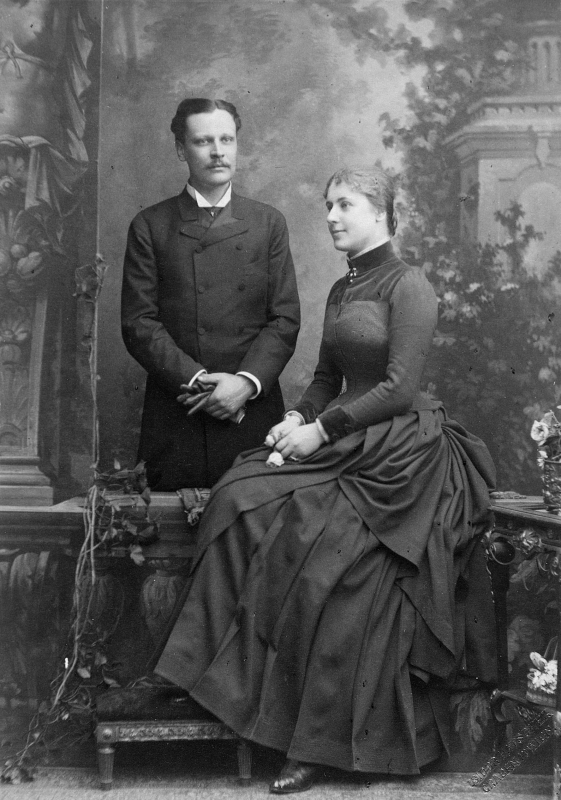 Manfred von Clary-Aldringen (1852-1918) österr. Ministerpräsident mit seiner Frau Franziska